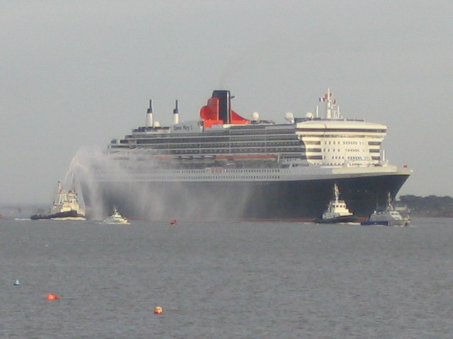 St Nazaire, lancement du Queen Mary 2, photo prise le 23/12/2003 par Harrieta171